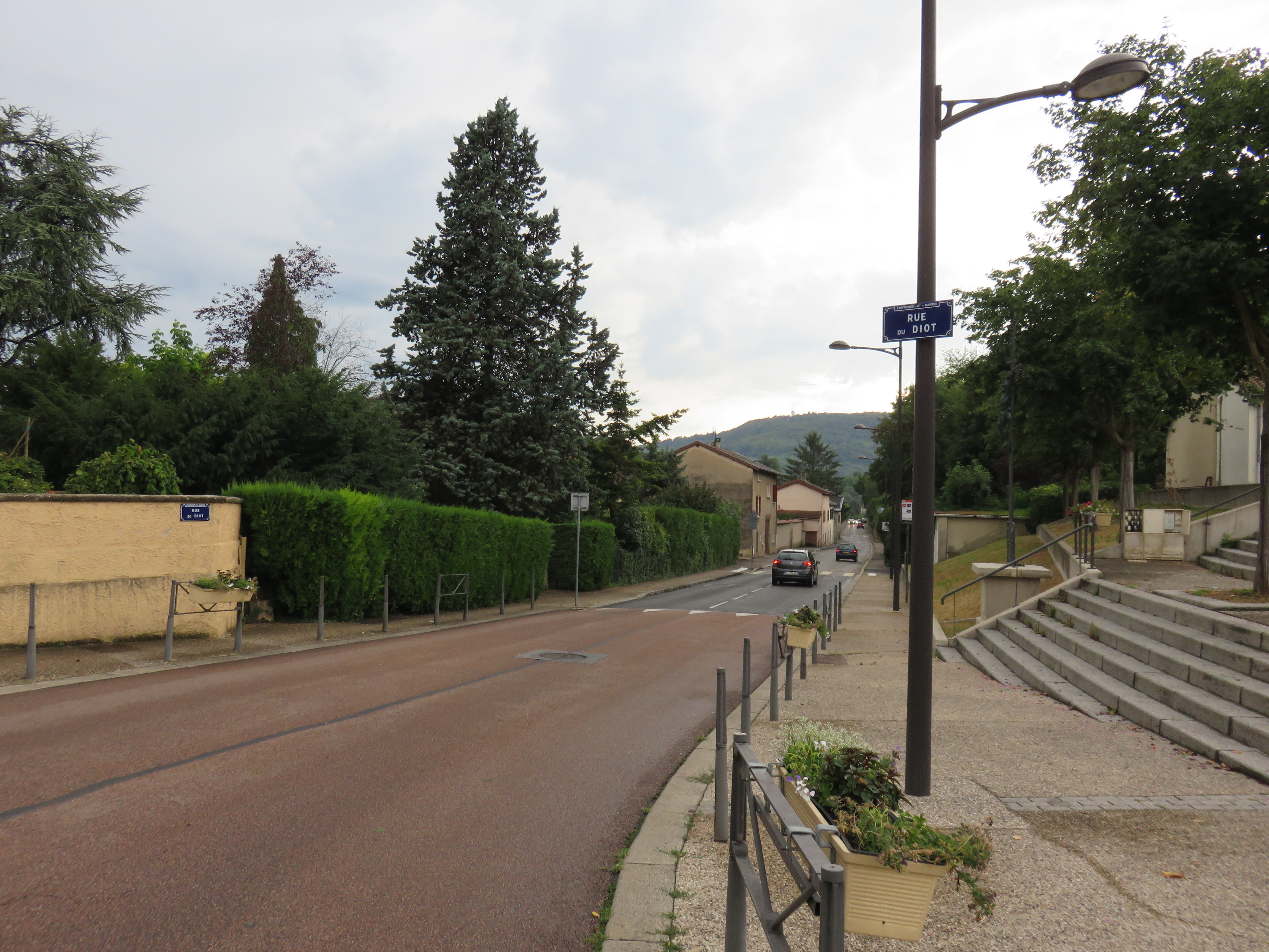 Rue du Diot à Fontaines-Saint-Martin (Rhône, France).